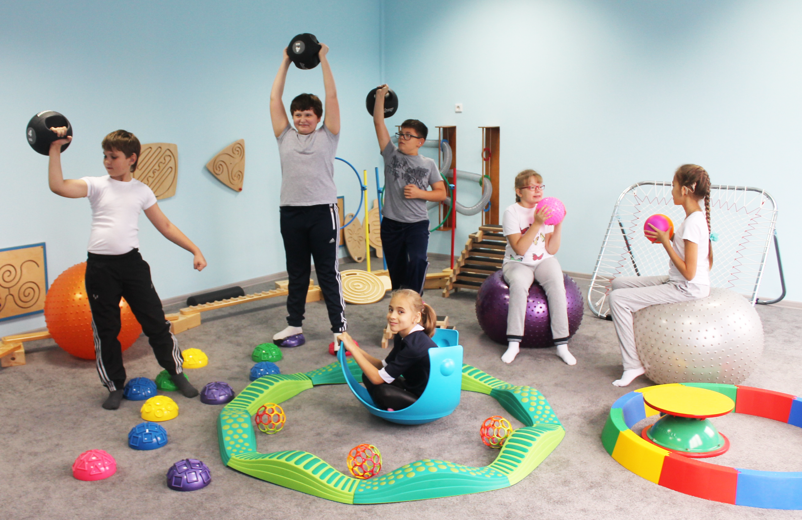 Дети